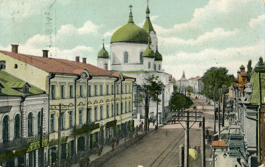 Житомир. Улица Киевская. Слева трехэтажный дом Товарищества подъездных дорог,за ним Свято-Михайловская церкоь,построенная в 1856 году-купцом М.Хаботиным.Всемірный почтовый союз.Россія.Изданіе Г.Н.Лейбенгрца въ Житоміръ.Эрнестъ Г.Свенстремъ,Стокгольмъ.